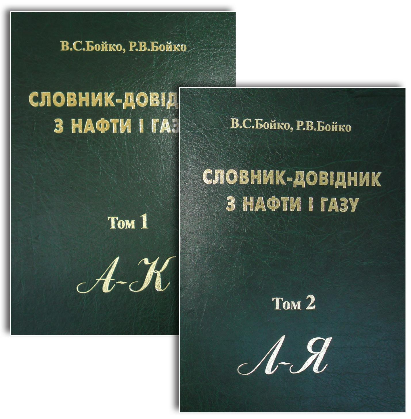 Бойко В.С., Бойко Р.В. Тлумачно-термінологічний словник-довідник з нафти і газу